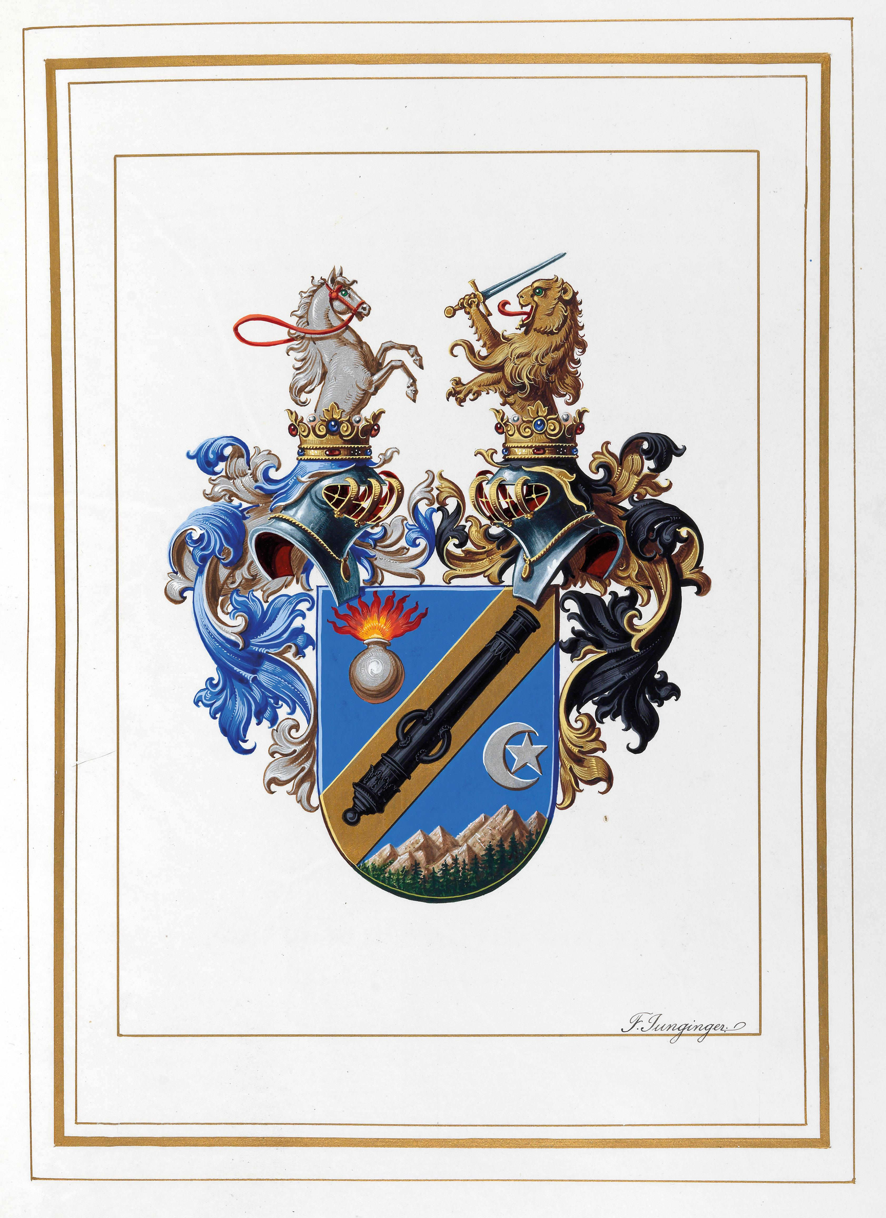 Wappen aus dem Ritterstandsdiplom für Feldzeugmeister Ferdinand Goglia, Kommandant des 5. Korps, Wien, 31. Januar 1917, signiert "F(riedrich) Junginger"